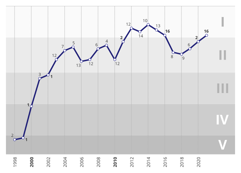 Wykres przedstawiający pozycje zajmowane przez drużynę piłkarską BBTS i Podbeskidzia Bielsko-Biała w rozgrywkach ligowych od 1998.